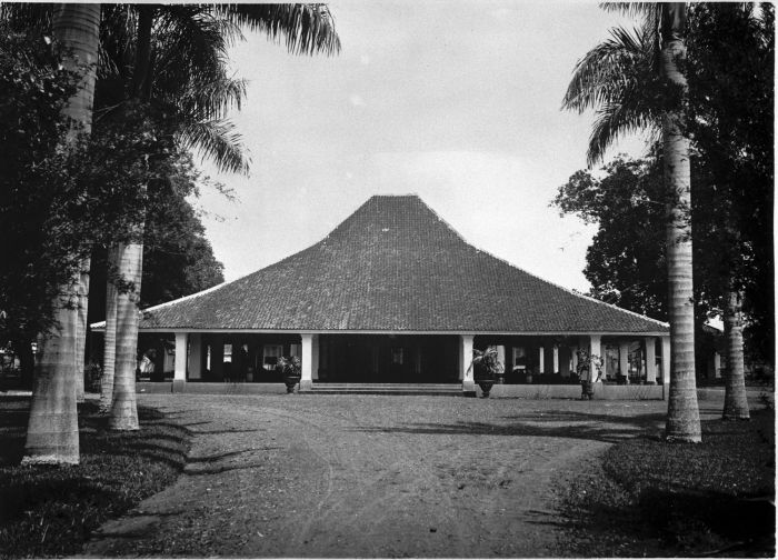 Foto. Regentswoning te Malang.